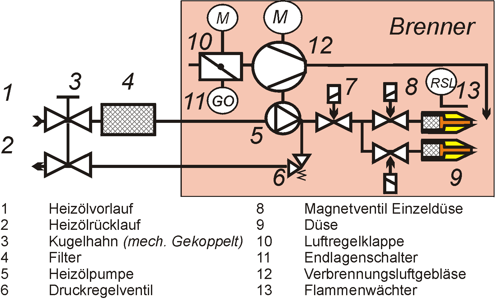 Zweistufiger Öl-Zerstäubungsbrenner